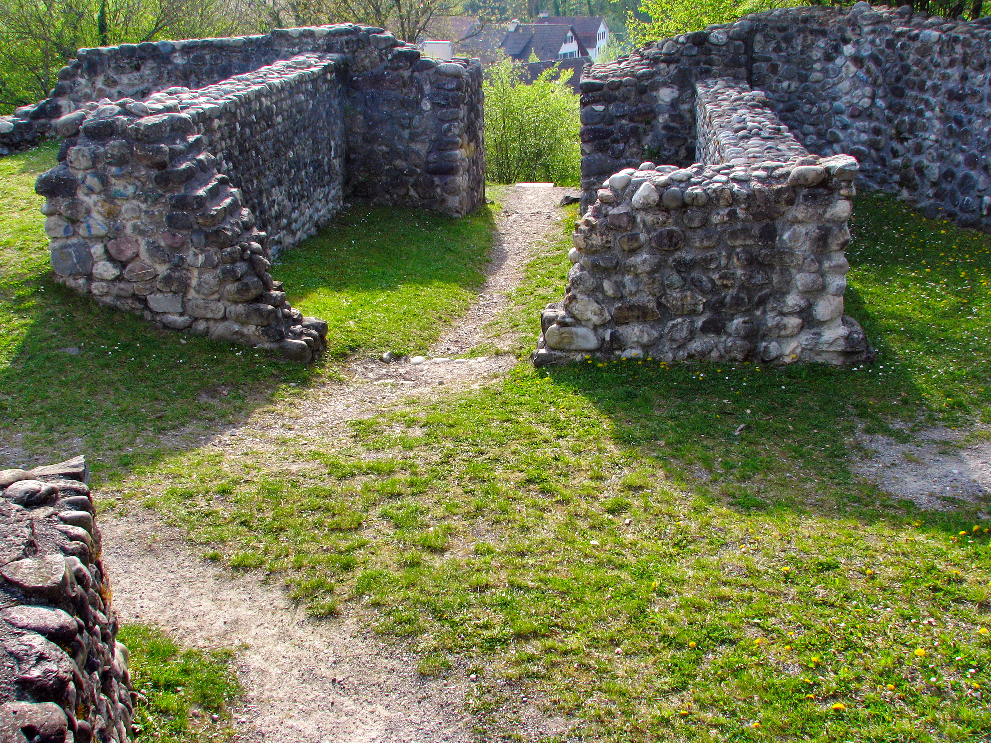 Altburg (Alt-Regensberg) in Regensdorf (ZH)